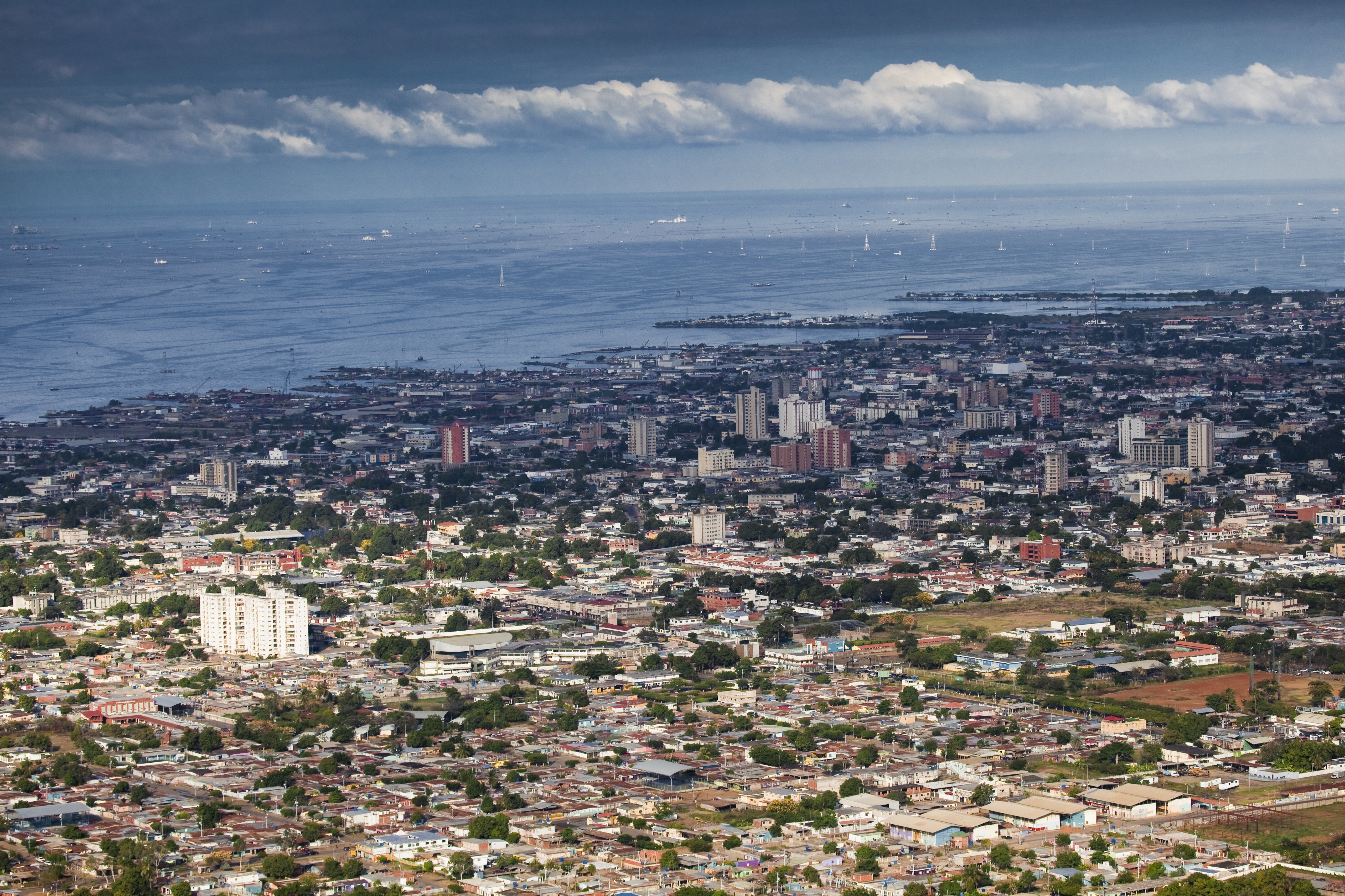 Vista aérea "Ciudad Ojeda"